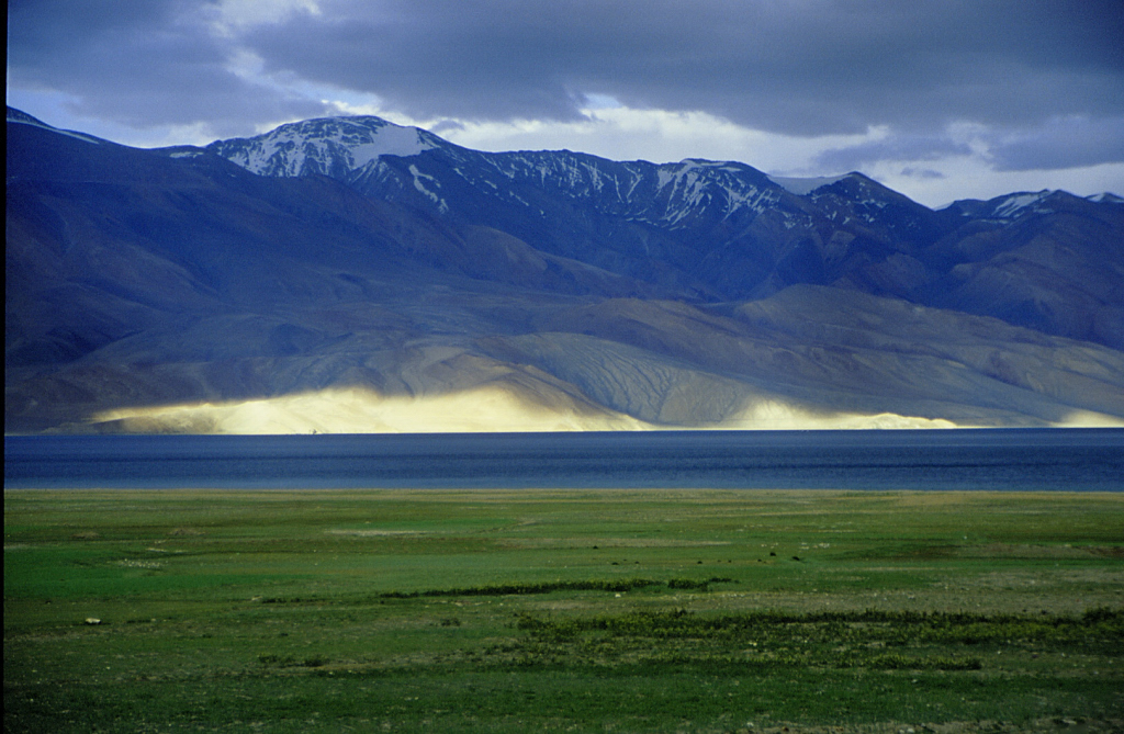 Ladakh, Tso Moriri Lake.